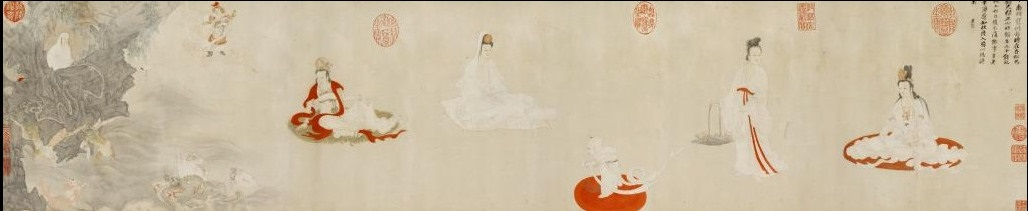 Cinq formes du bodhisattva Guanyin, peinture par le peintre chinois Ding Yunpeng du XVIe-XVIIe siècles, rouleau mural, encre, couleur et or sur papier, vers 1580. Ses dimensions ne sont pas données. Cette œuvre est conservée au Nelson-Atkins Museum of Art de Kansas City.